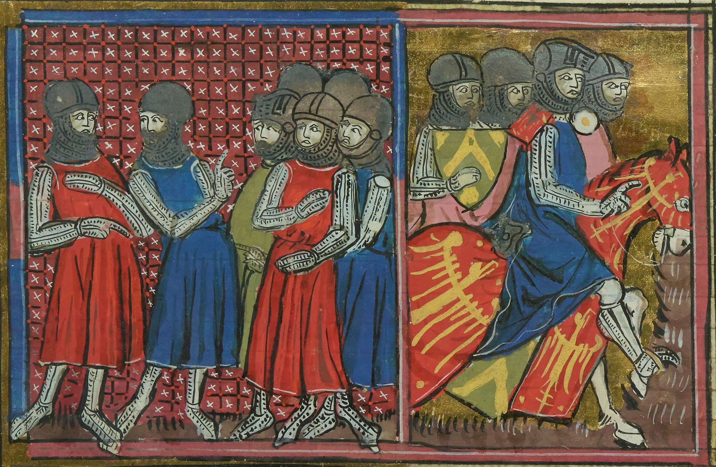 départ de Baudouin Ier pour l'Arménie